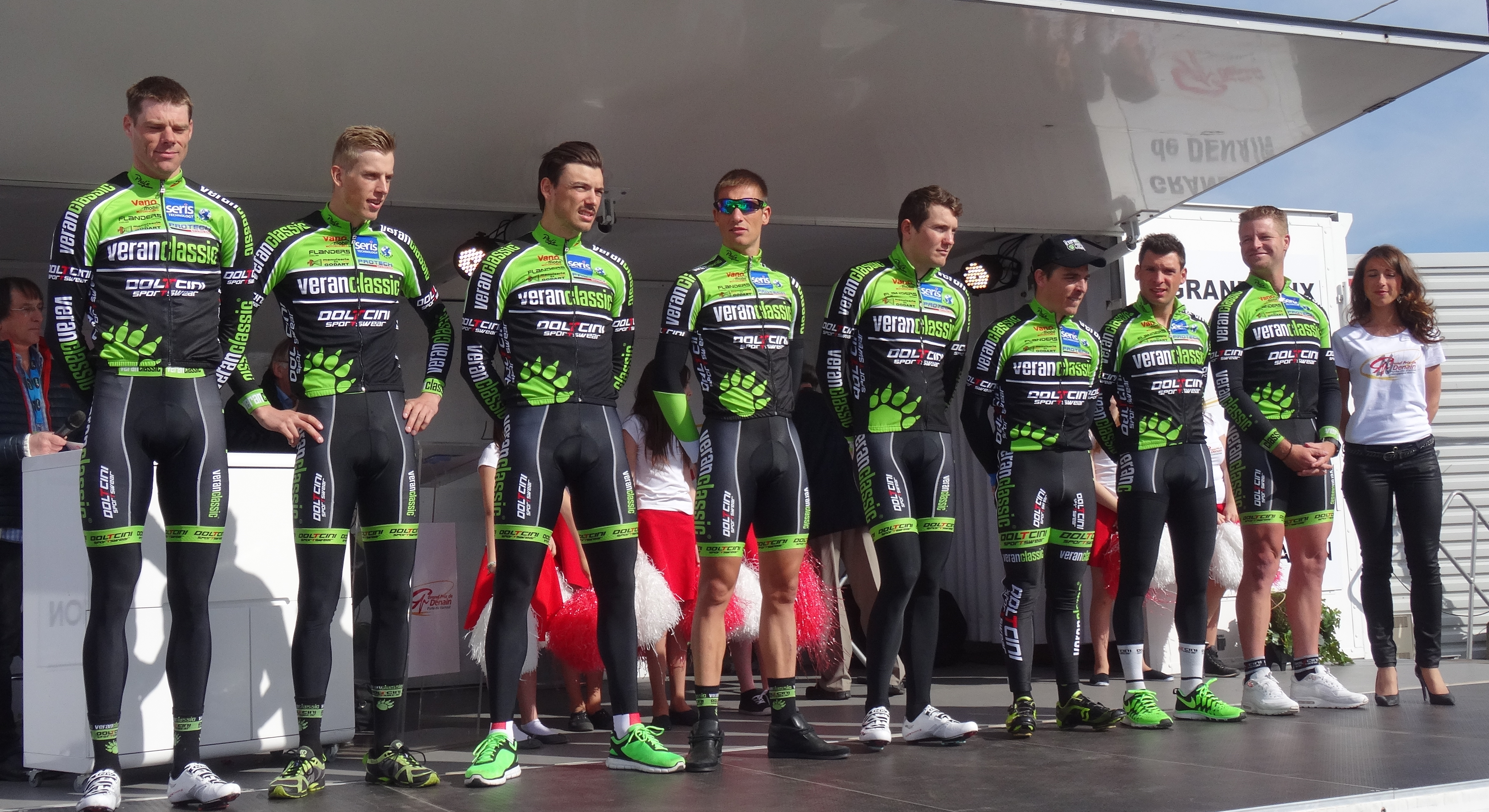 Reportage réalisé le jeudi 17 avril à l'occasion du départ et de l'arrivée du Grand Prix de Denain 2014 à Denain, Nord, Nord-Pas-de-Calais, France.